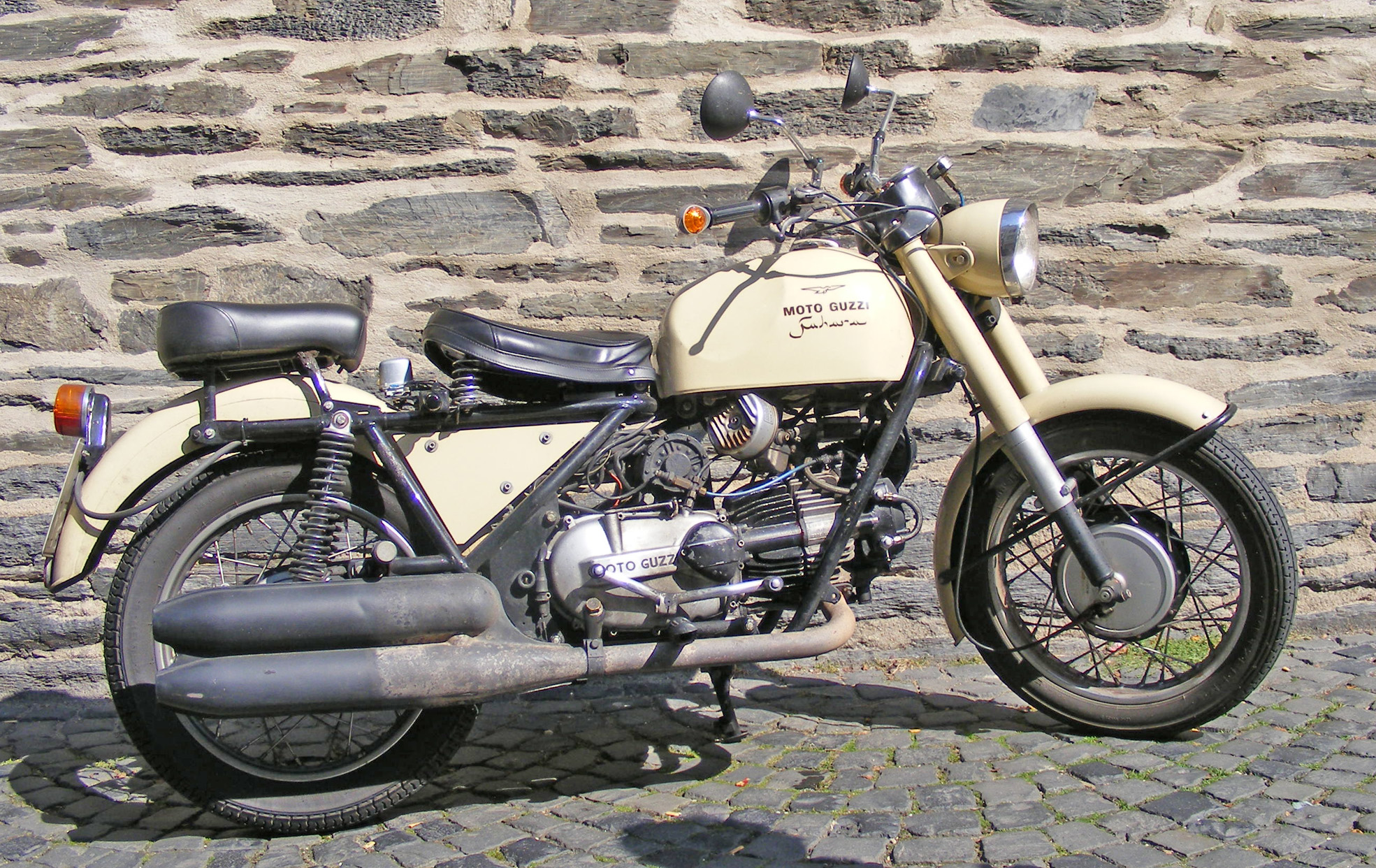 Moto guzzi Oldtimer Motorrad Monschau 2008